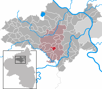 Gierschnach in Rhineland-Palatinate - district Mayen-Koblenz